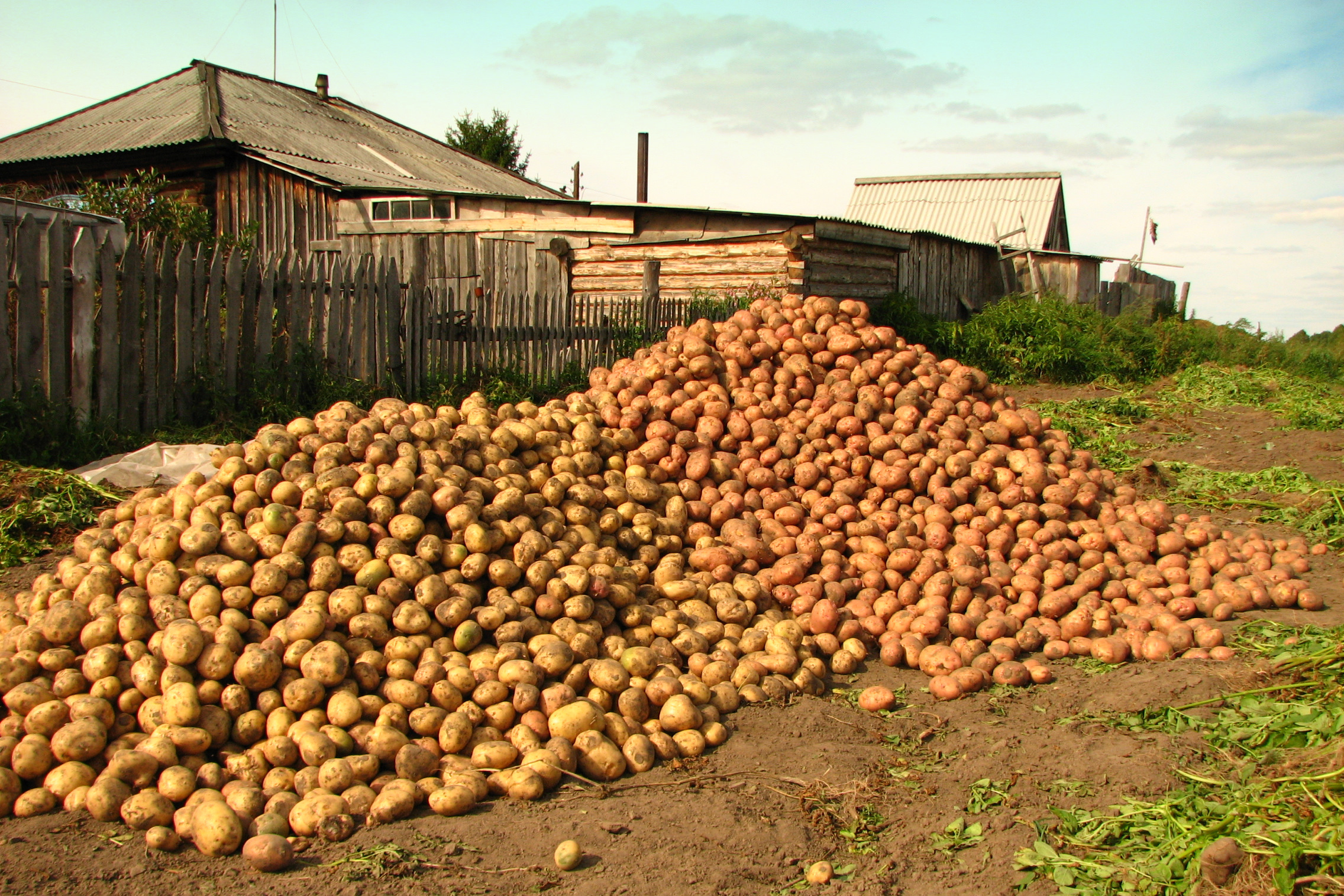 Бутаково осенью. Урожай картофеля.